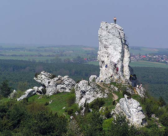 Skałka Wysoka w Rzędkowicach na terenie Jury Krakowsko-Częstochowskiej. Oświadczam, że jestem autorem zdjęcia i nadaję mu status PD - Andrzej Makarczuk.